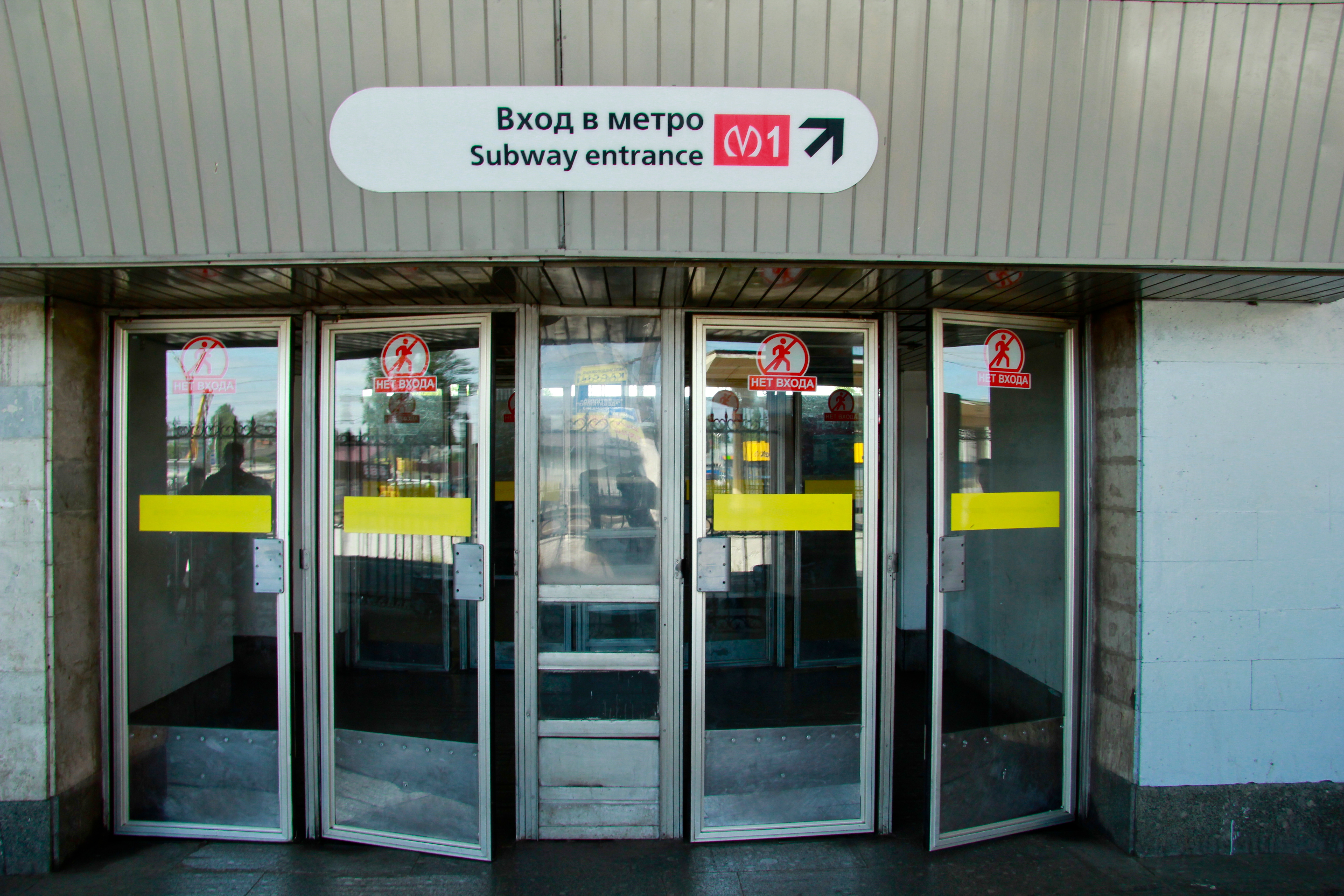 St. Petersburg Metro (Петербургский метрополитен) Kirovsko-Vyborgskaya Line (Кировско-Выборгская линия)